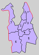 福井県敦賀郡の町村制時点の町村。